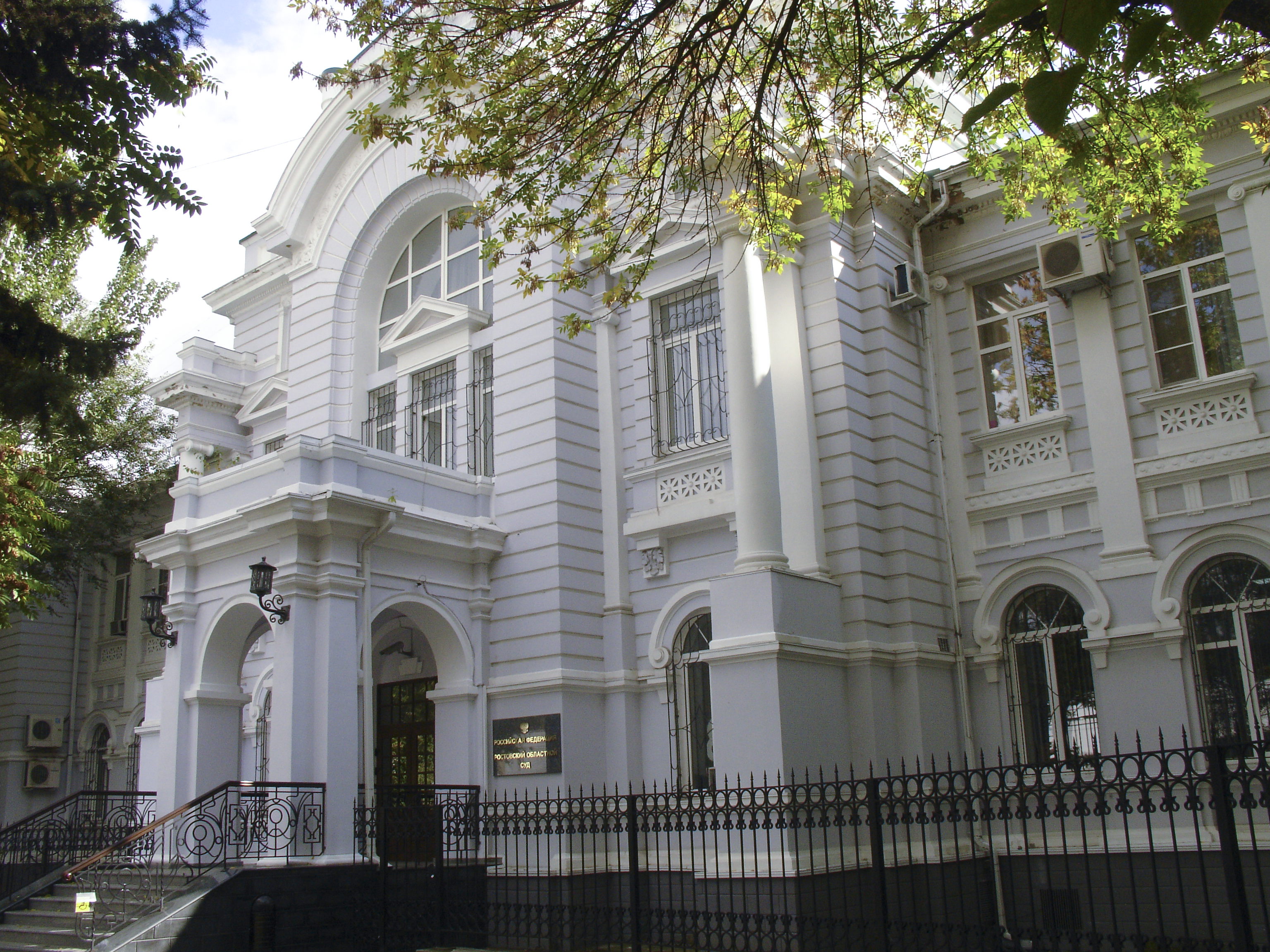 Здание окружного суда: улица Социалистическая, 164/35, улица Журавлева, литер А, Ростов-на-Дону, Ростовская область. Сейчас в этом здании находится Областной Суд Ростовской области.